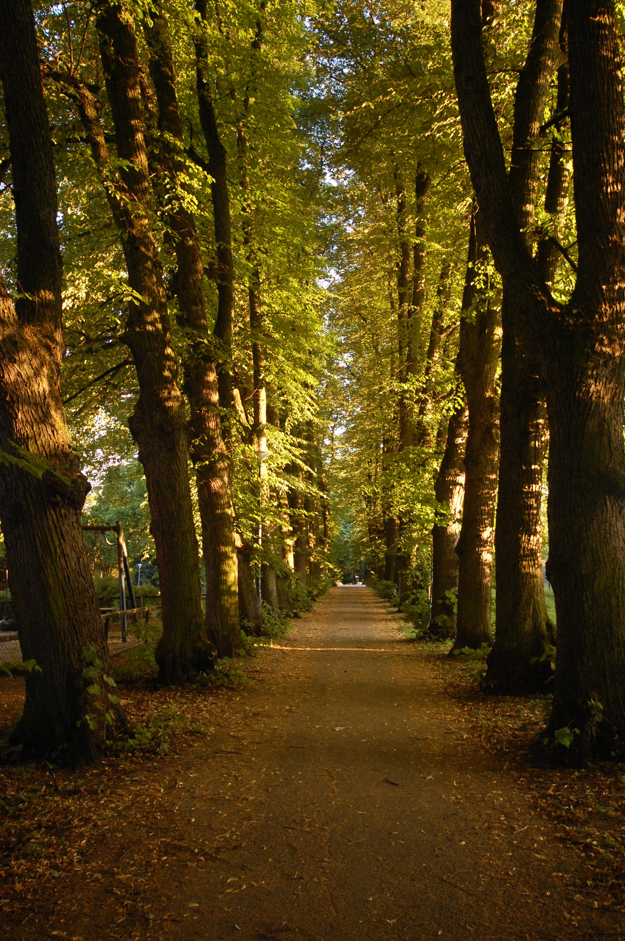 Lindealleen i Bjølsenparken